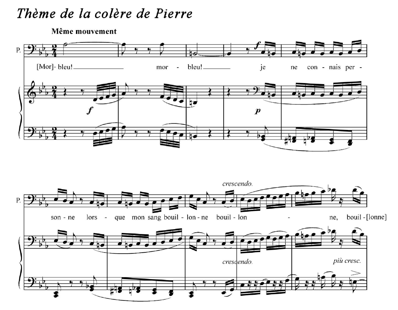 Thème de la colère de Pierre extrait de l'Etoile du Nord de Meyerbeer